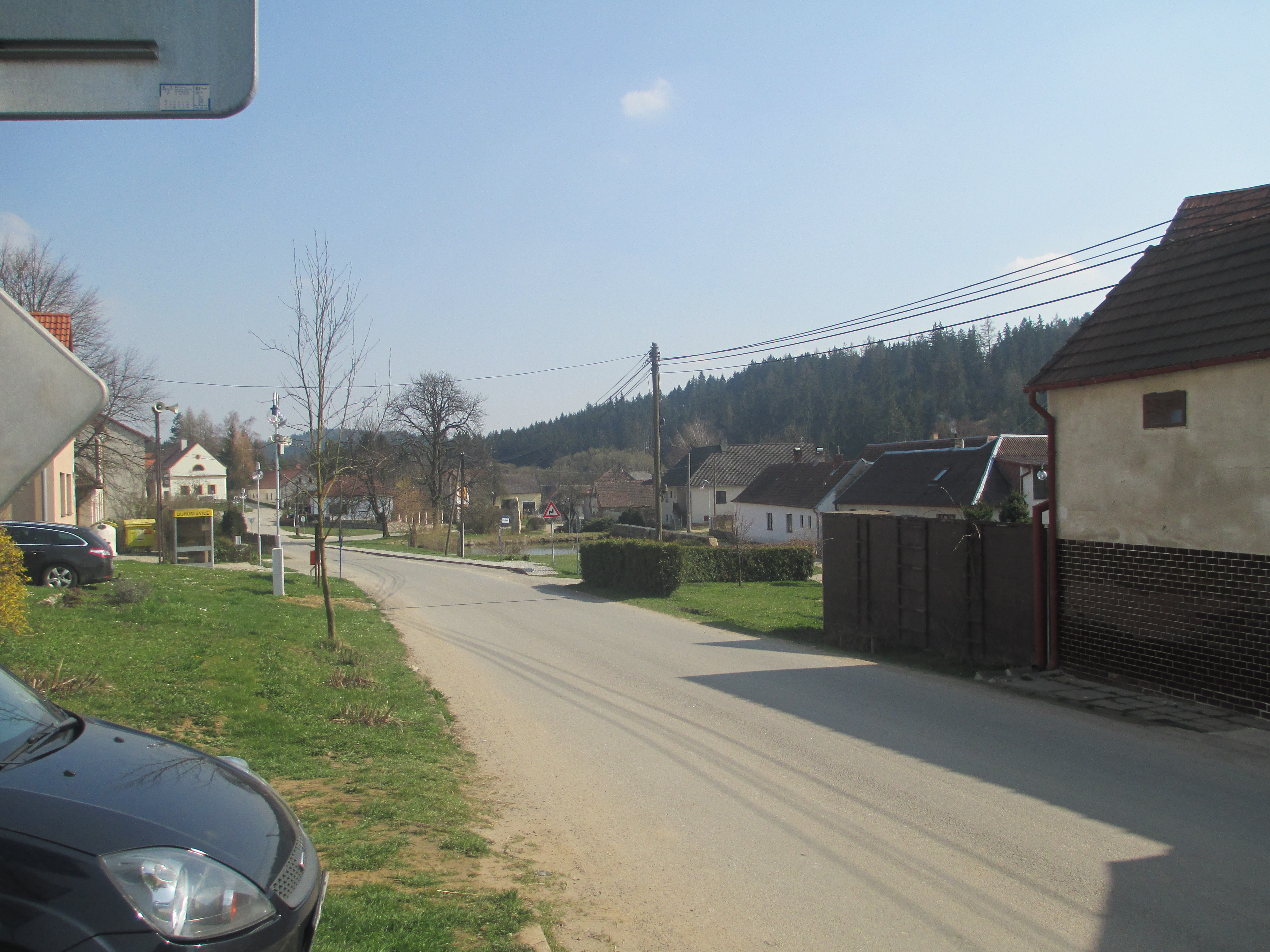 Náves v obci Bohuslavice